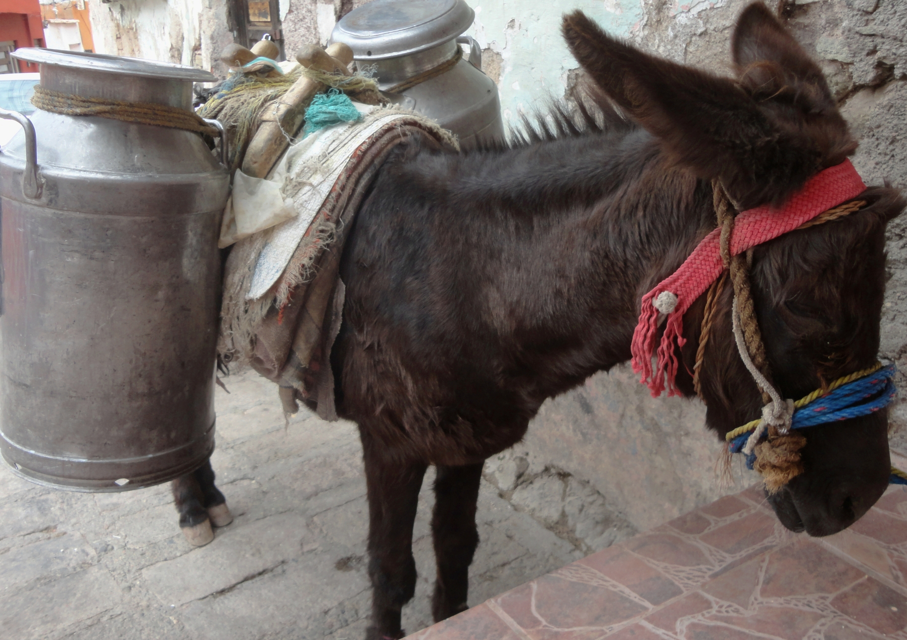 Burro lechero en Guanajuato, México. Equus africanus asinus.